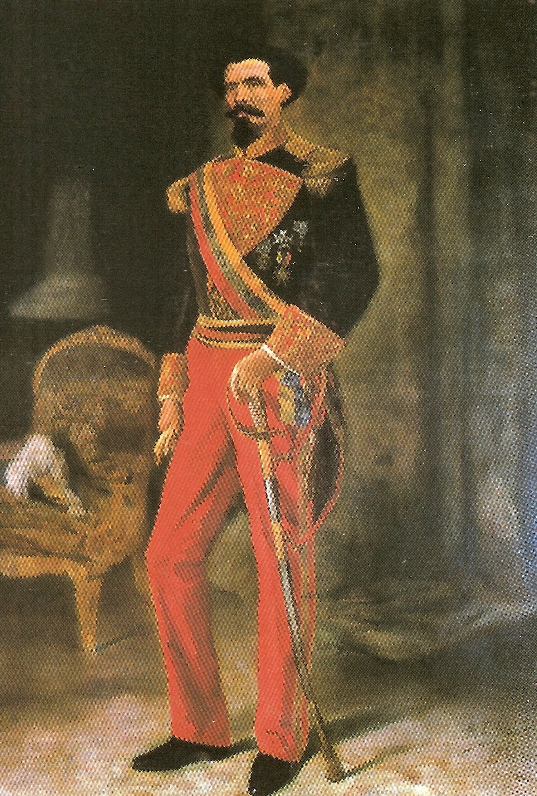 Francisco Linares Alcantara 1911 Ministerio de Relaciones Exteriores, Caracas - Venezuela